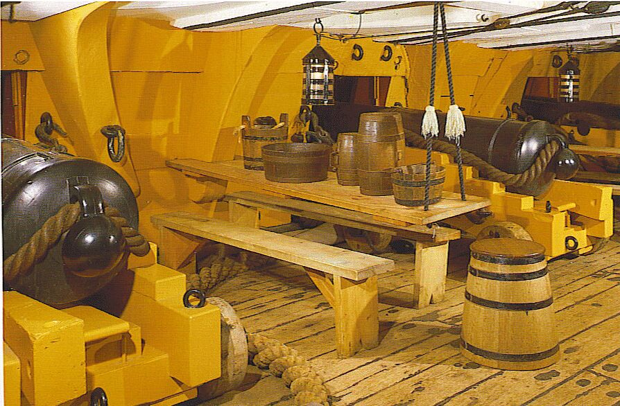 vue de la batterie inférieure du Victory, avec canons et lieux de vie de l'équipage